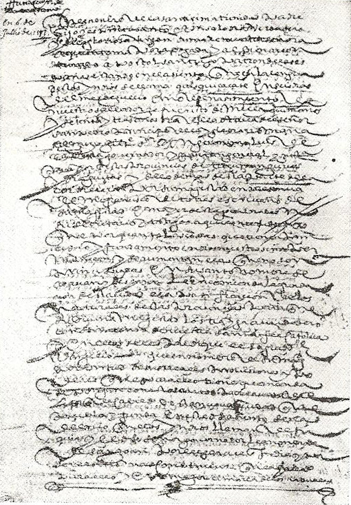 Acta de fundación de la ciudad de Córdoba, Argentina. Según la transcripción dice, "Que por cuanto las cosas que no tienen principio y fundamento en Dios nuestro Señor permanecen y se aumentan y las que no son principiadas en su Santo nombre se acaban y se deshacen, le encomienda la fundación de esta nueva Ciudad y la pacificación de los naturales de estas Provincias para que su Divina Magestad los traiga a verdaderos conocimiento de nuestra Santa Fe Católica y en ella se les predique el Sagrado Evangelio y que en nombre de Su Magestad, por virtud de sus Reales Provisiones y Poderes que para ello tiene, que manda se pongan en estos autos por cabeza del libro de Cabildo de esta nueva Ciudad, que puebla y funda en este dicho asiento del Río que los indios de Suquía y el dicho Gobernador le ha nombrado de San Juan por llegar a él en su día y por ser el sitio más conveniente que ha hallado para ello y en mejor comarca de los naturales y en tierras baldías, donde ellos no tienen ni han tenido aprovechamiento, por no tener sacadas acequias de ellas, por tener mucha abundancia y mejores tierras y haber en el dicho asiento las cosas necesarias y bastantes y suficientes que han de tener las ciudades en nombre de Su Magestad se fundan, como son dos ríos caudales que tienen en término de tres leguas, de muy escogidas, aguas, con mucho pescado y que el uno alcanza a entrar en el Río de la Plata, donde ha de tener puerto esta Ciudad para contratarse por el mar del norte con los Reinos de Castilla, y estar el dicho puerto a poco más de veinte leguas de aquí, y ser el dicho asiento sano y de buen temple y abundante de montes para leña, y piedra y cal y maderas y tierras para heredamientos y dehezas para pastos de ganados y de mucha caza; y participa a dos leguas de las serranías y cordilleras a donde se han hallado muestras de todo género de metales, por donde se ampliará la corona de Castilla y quintos de Su Magestad..."